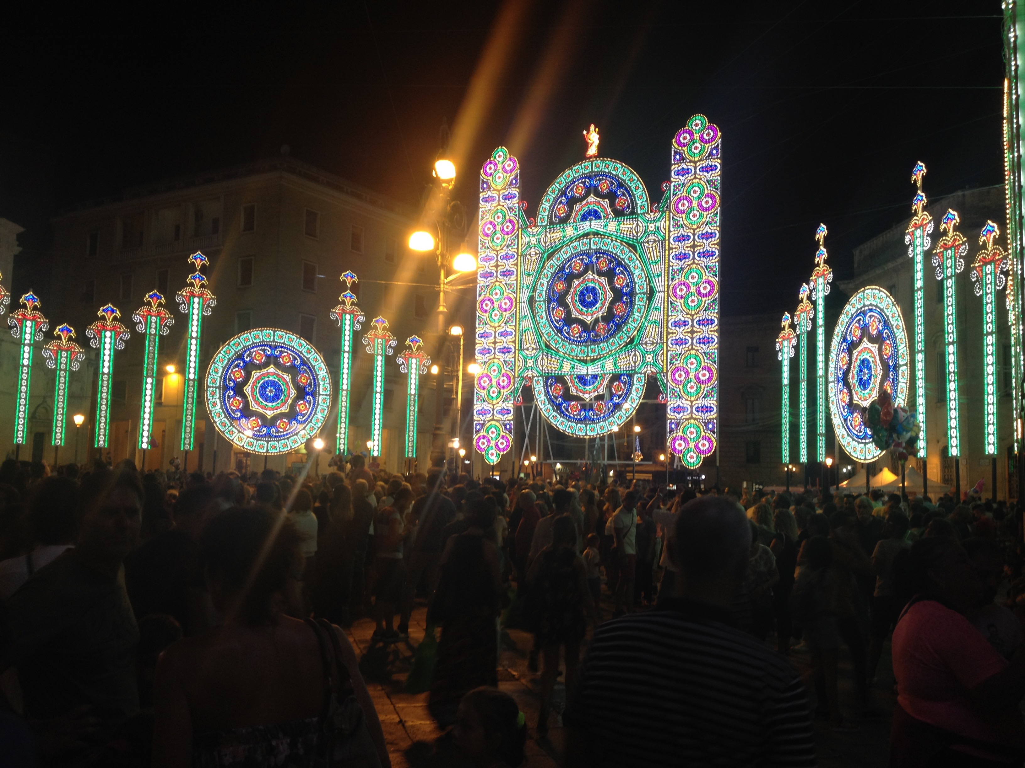 Le Luminarie della Festa di Sant'Oronzo a Lecce nel 2017